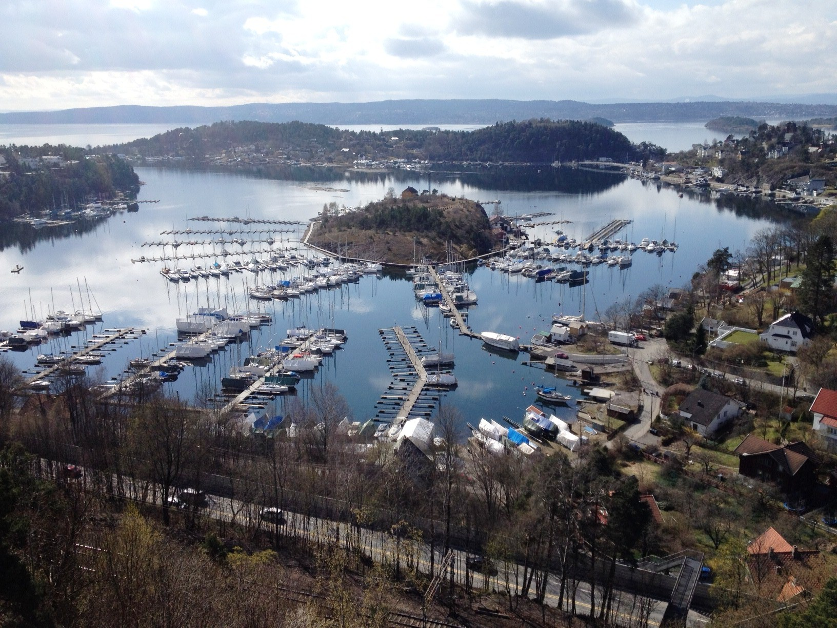 Paddehavet ved Oslo